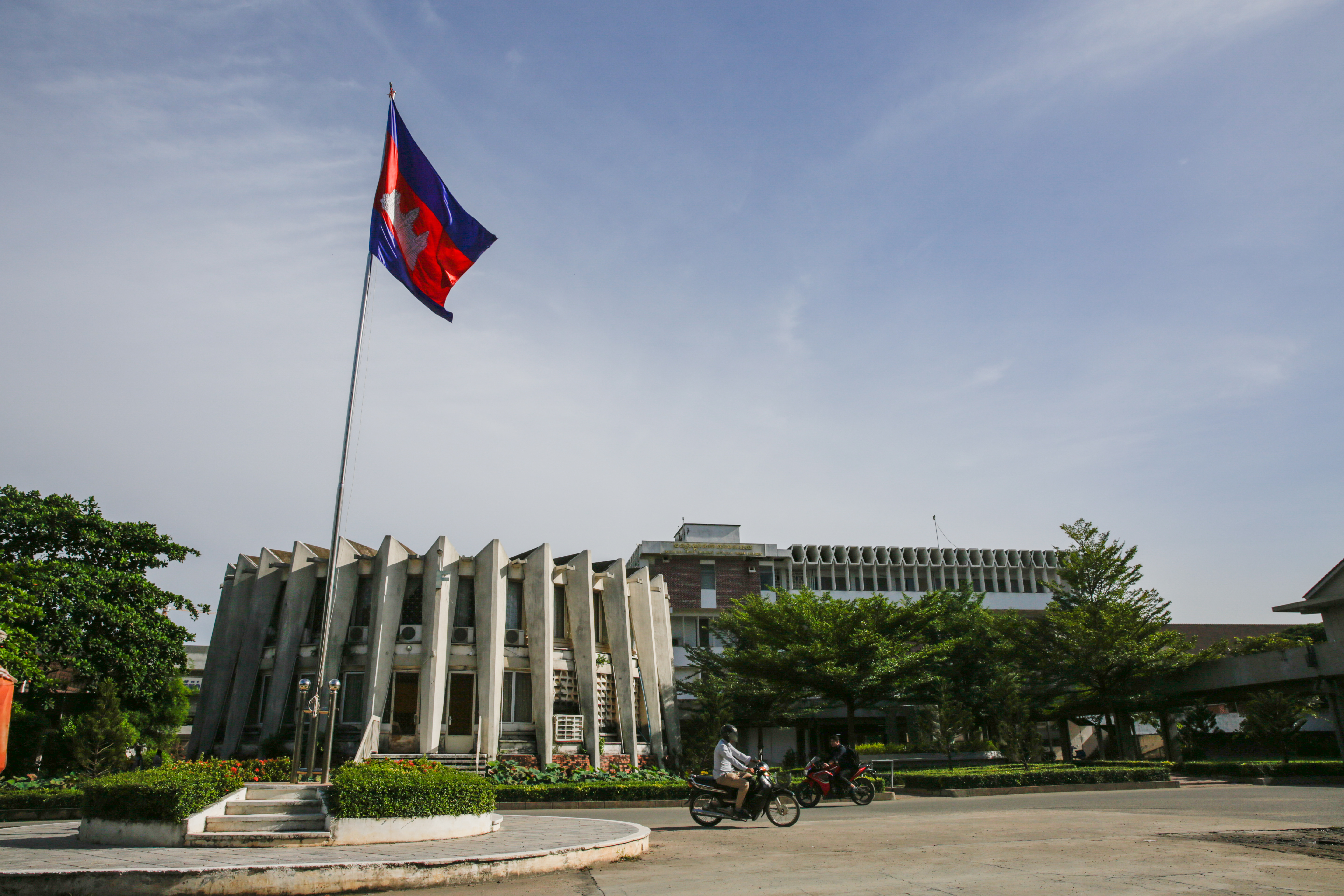 ភាសាខ្មែរ: ទិដ្ឋភាព​បរិវេណ​វិទ្យាស្ថាន​ភាសា​បរទេស​ នៃ​សាកលវិទ្យាល័យ​ភូមិន្ទ​ភ្នំពេញ នា​ថ្ងៃ​ទី​២៩​ ខែ​សីហា ឆ្នាំ ២០១៧។ អគារ​សិក្សា​នេះ​ជា​ស្នាដៃ​ស្ថាបត្យកម្ម​របស់​លោក​ វណ្ណ​ មូលីវណ្ណ​ ដែល​ដើម​ឡើយ​ជា​មហាវិទ្យាល័យ​ហ្វឹកហ្វឺន​គ្រូ​បង្រៀន សម្រាប់​និស្សិត​ ចាប់​ផ្តើម​សាងសង់​ក្នុង​ឆ្នាំ​១៩៦៥។